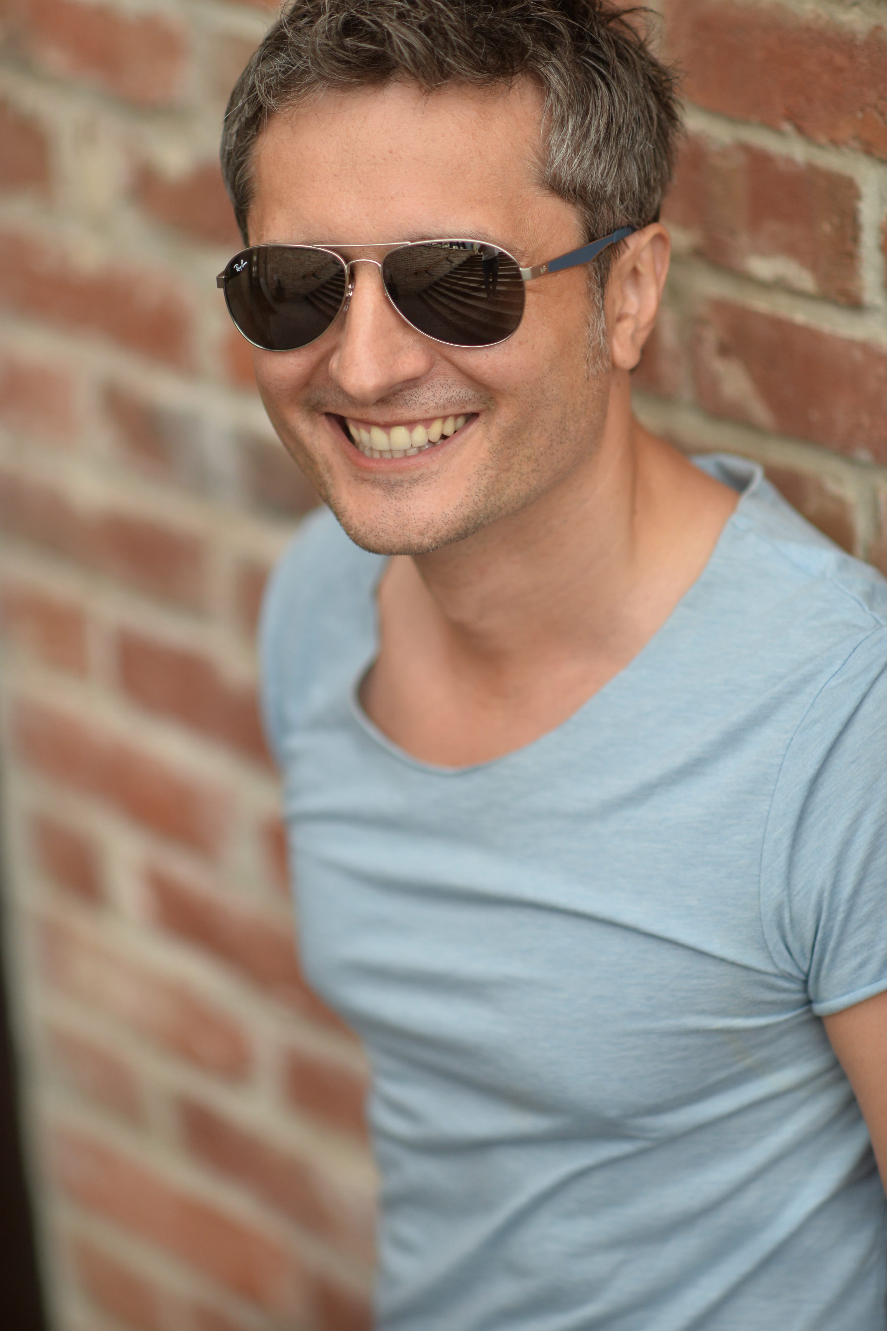 Віктор Винник